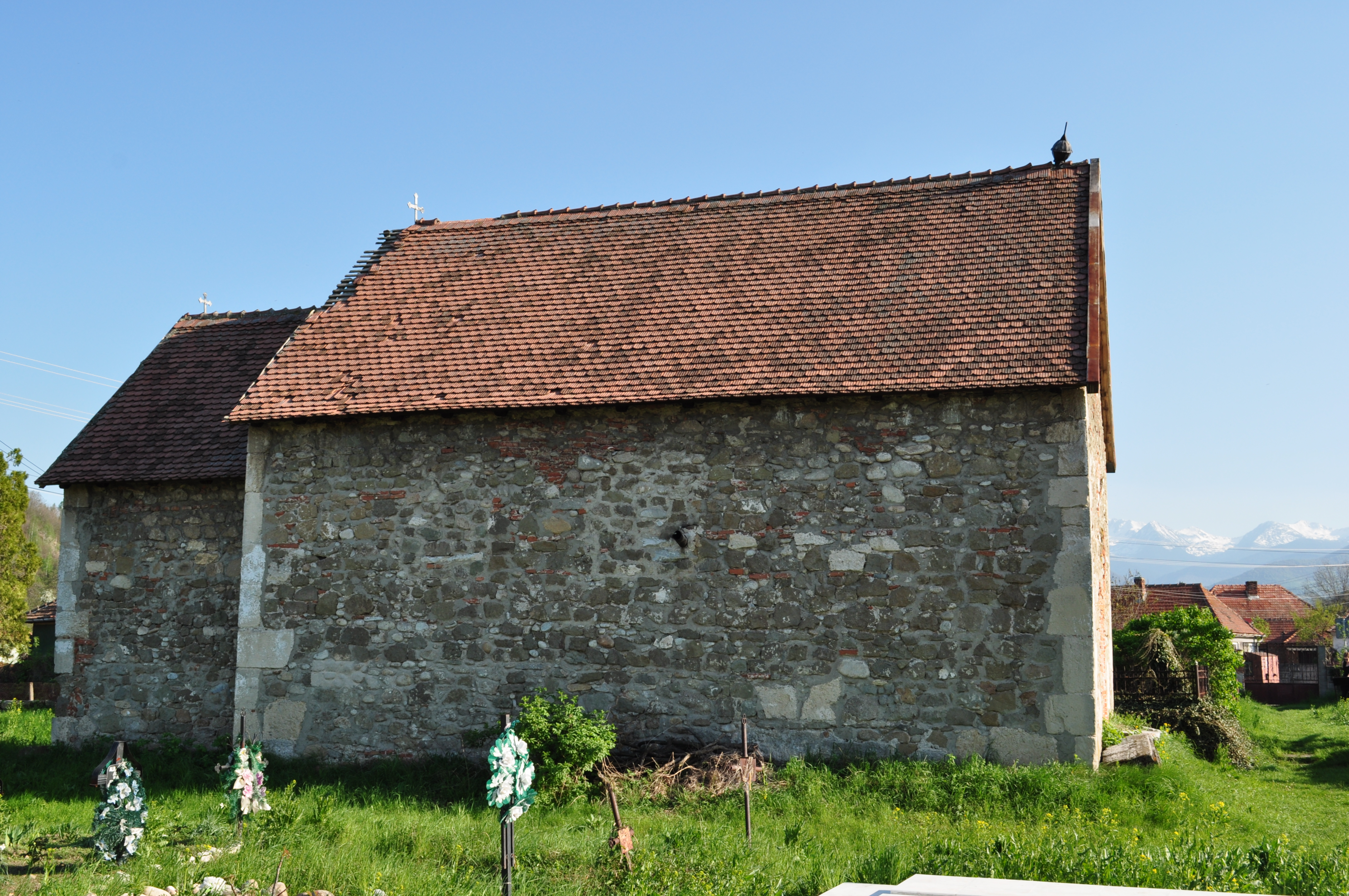 Biserica "Sf. Mare Mucenic Gheorghe", sat SÂNPETRU; comuna SÂNTĂMĂRIA-ORLEA